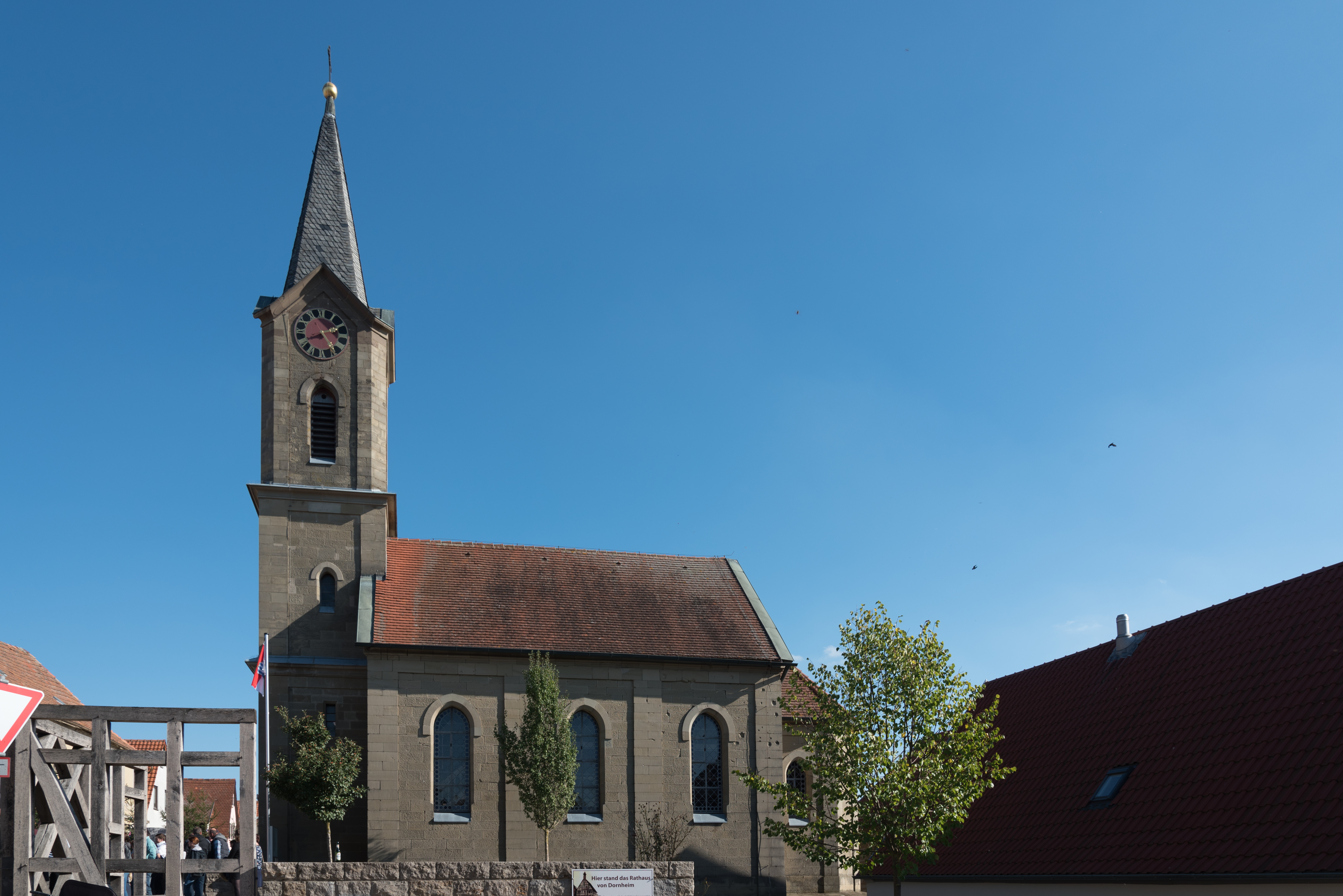 Iphofen, Dornheim, Altmannshäuser Straße 16, ev. Kirche